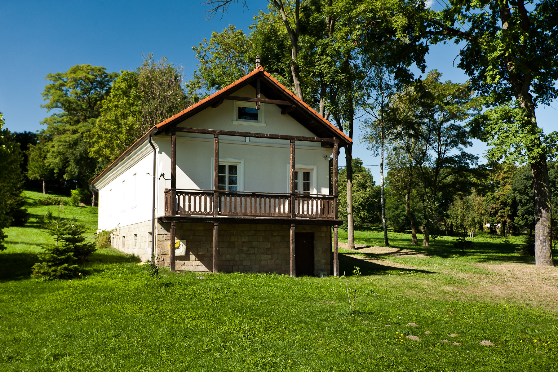 Ujazd - oficyna w zespole dworskim